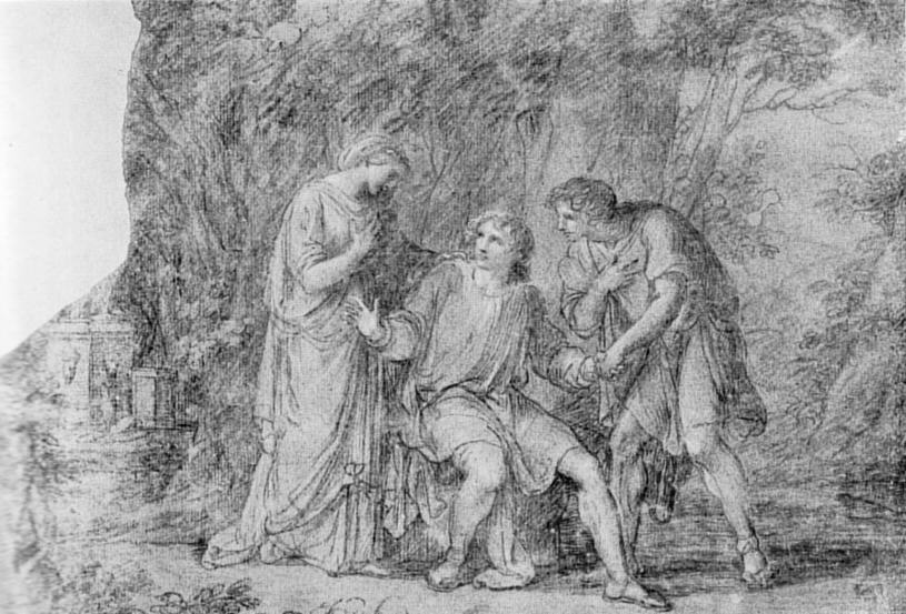 Szene aus Goethes Iphignie, Kohlezeichnung von Angelika Kauffmann, 1787. Erste Fassung des bekannten Blattes in Goethes Nachlaß, aus früherem Besitz der Luise Göchhausen. Kauffmann hat auch für die Göchsche Ausgabe der Werke die folgenden Blätter gezeichnet.